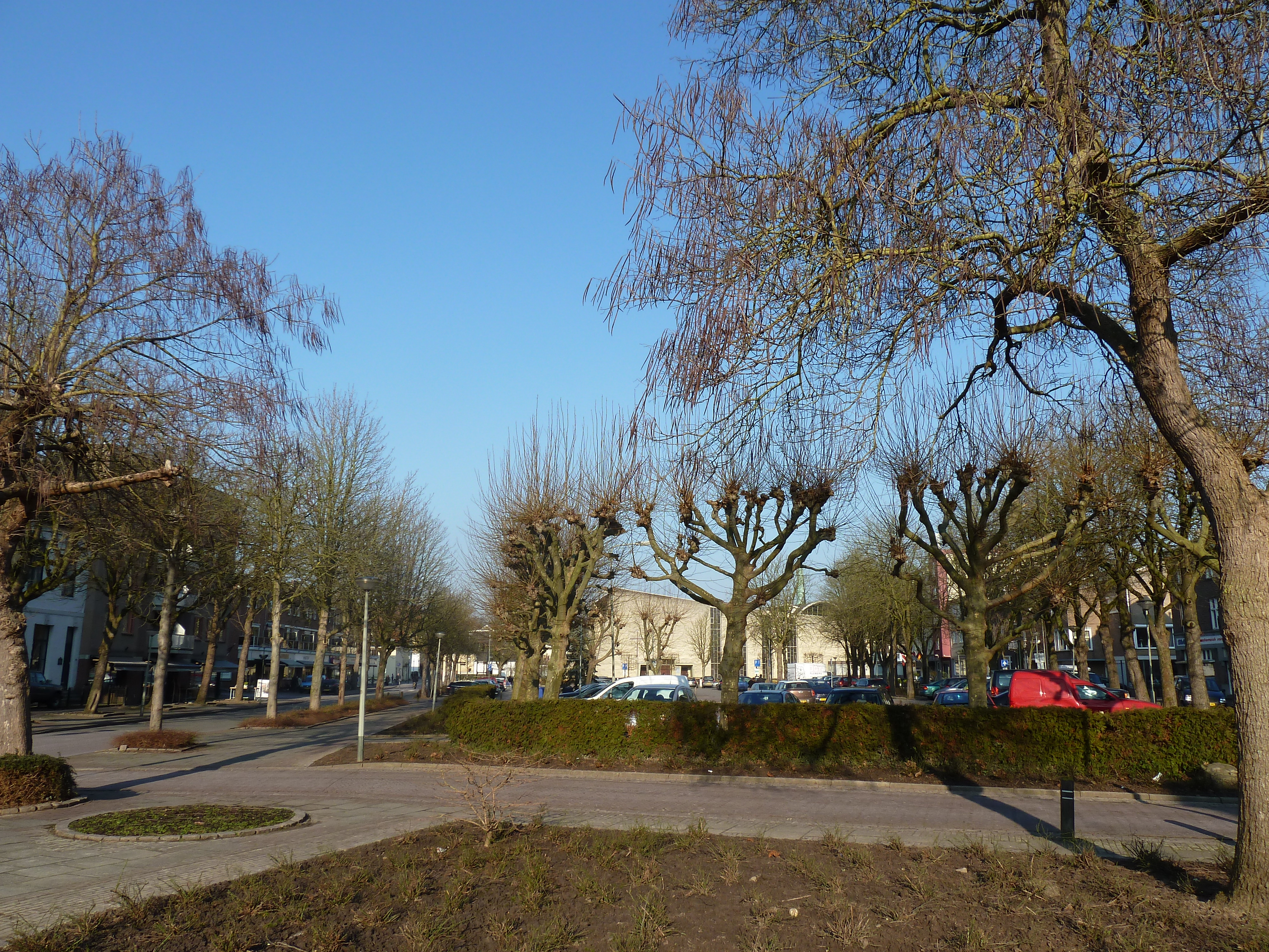 Walramplein in Valkenburg, Limburg, Nederland